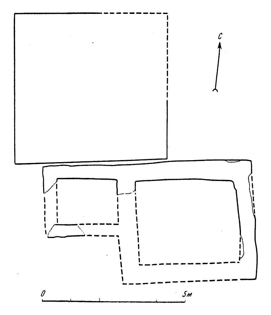 Каменны церам і драўляная пабудова